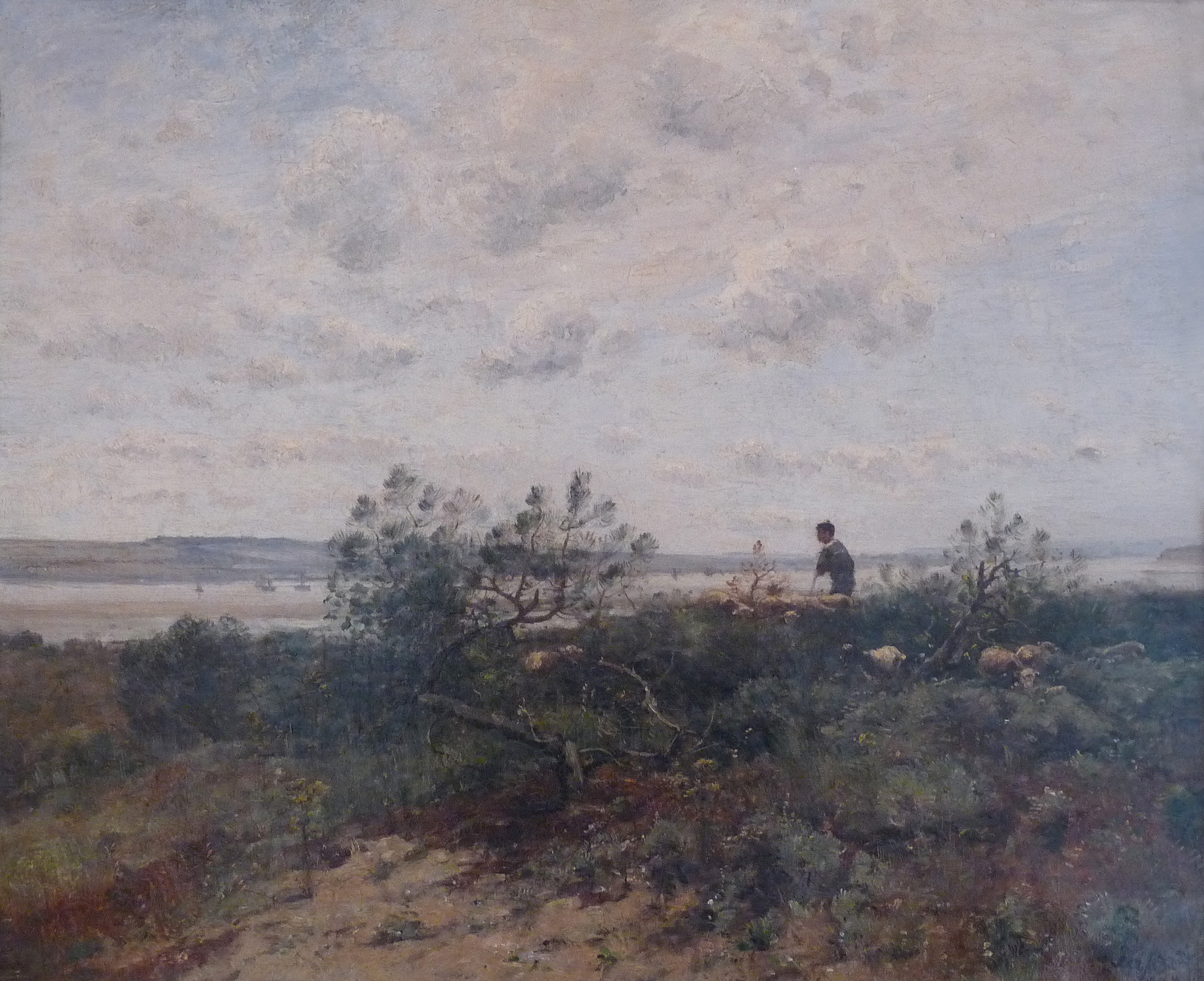 Louis-Aimé Japy (1840-1916), Paysage. Musée barrois (Bar-le-Duc)